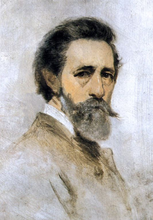 Anton Burger: Selbstbildnis, Öl/Holz, 33.5x28.5 cm